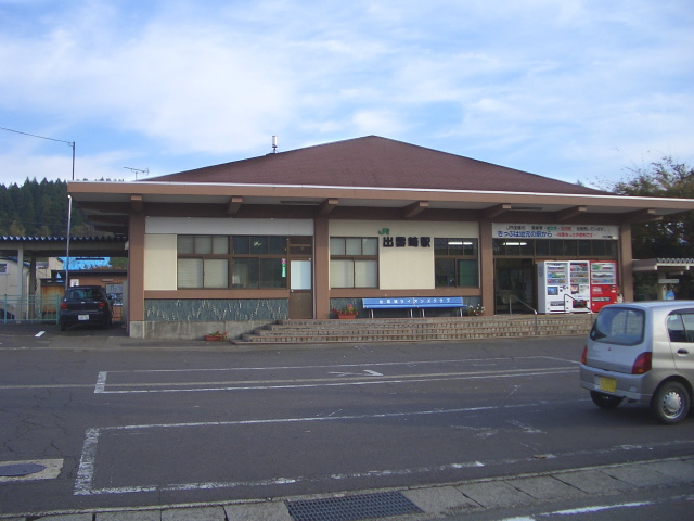 JR出雲崎駅 新潟県出雲崎町